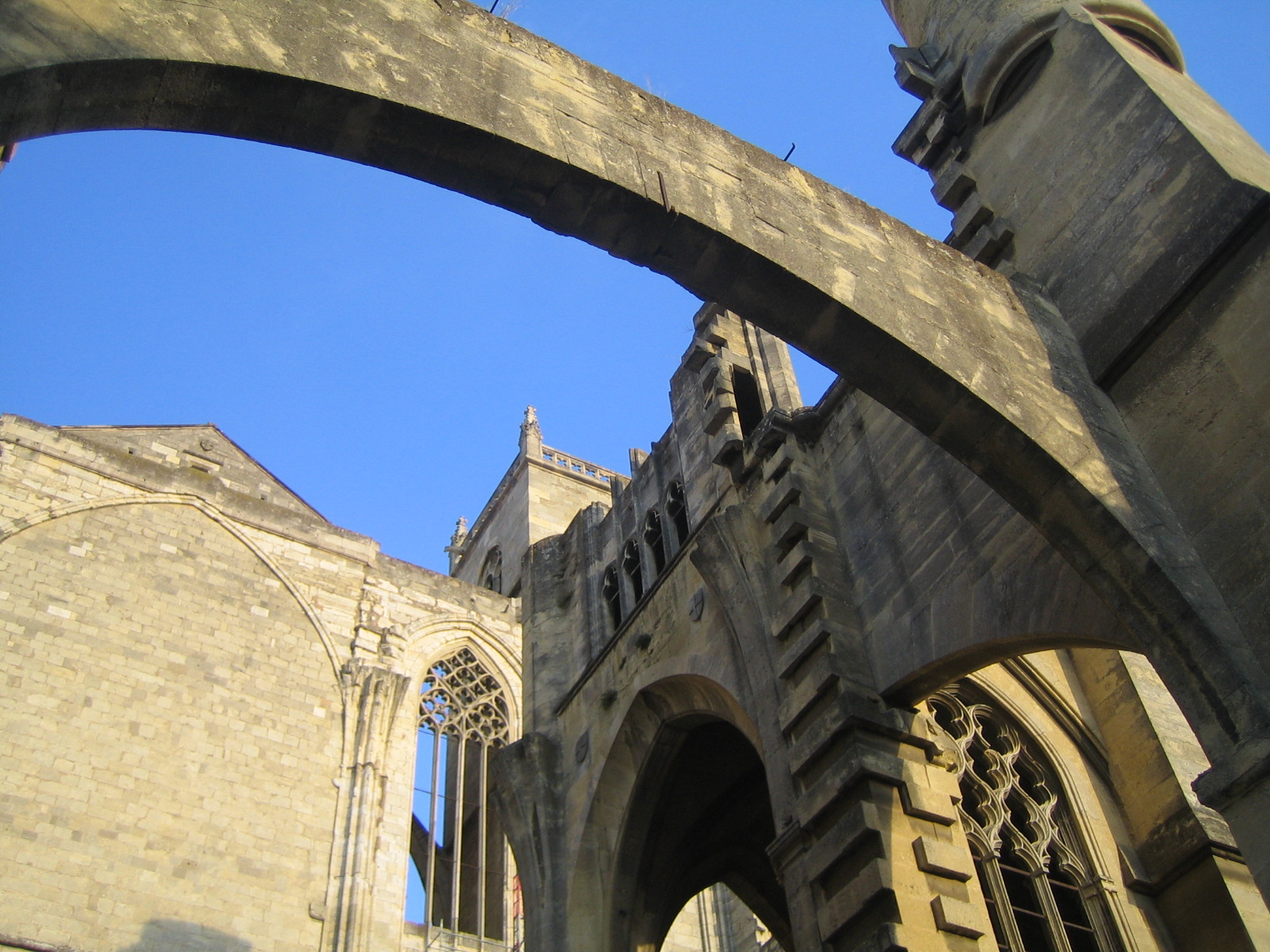 Cathédrale Saint-Just04